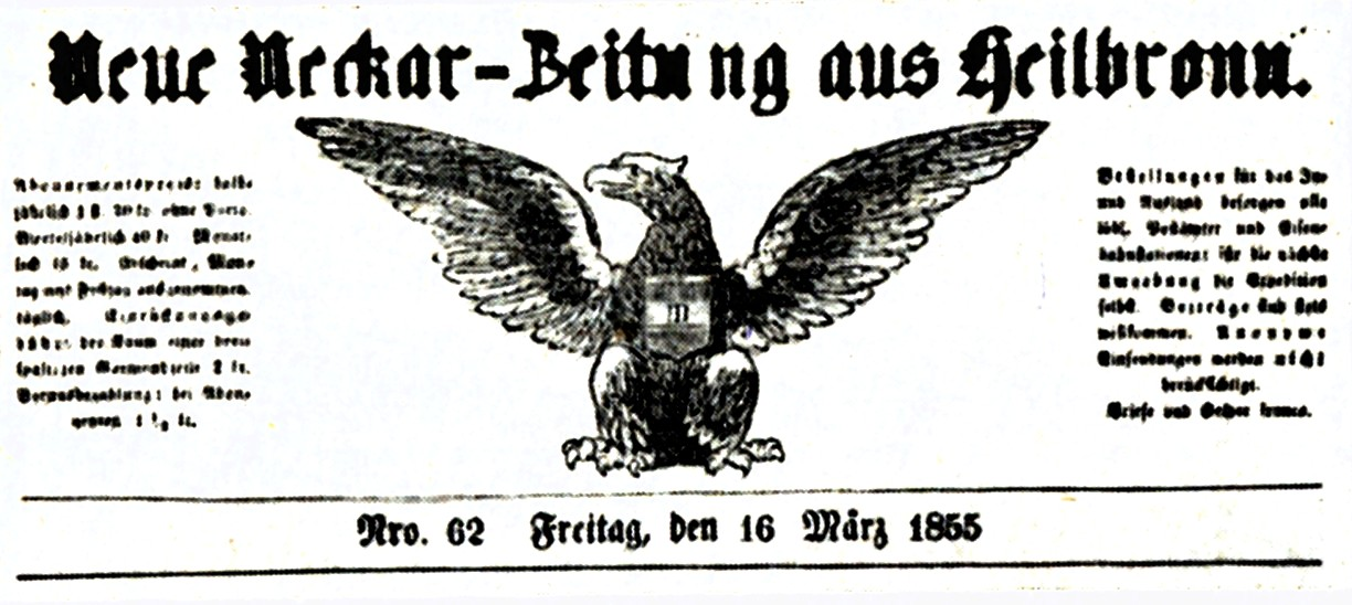 Titelkopf der Heilbronner Zeitung Neue Neckar-Zeitung aus Heilbronn